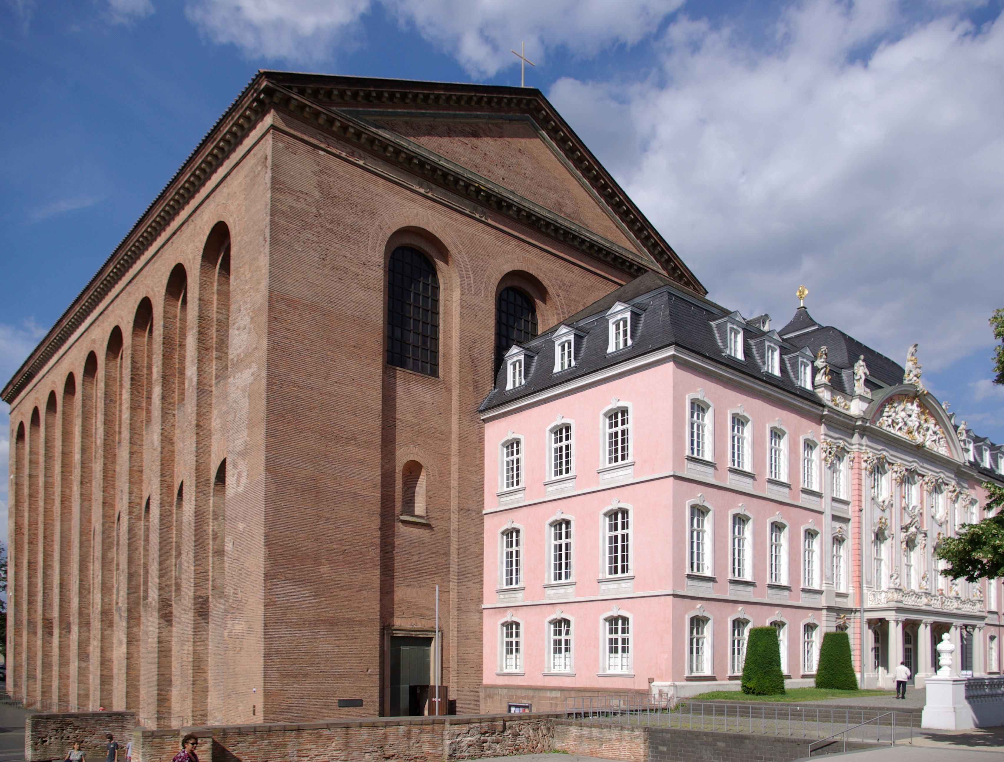 Kürfürstliches Palais, Übergang zur Konstantinbasilika